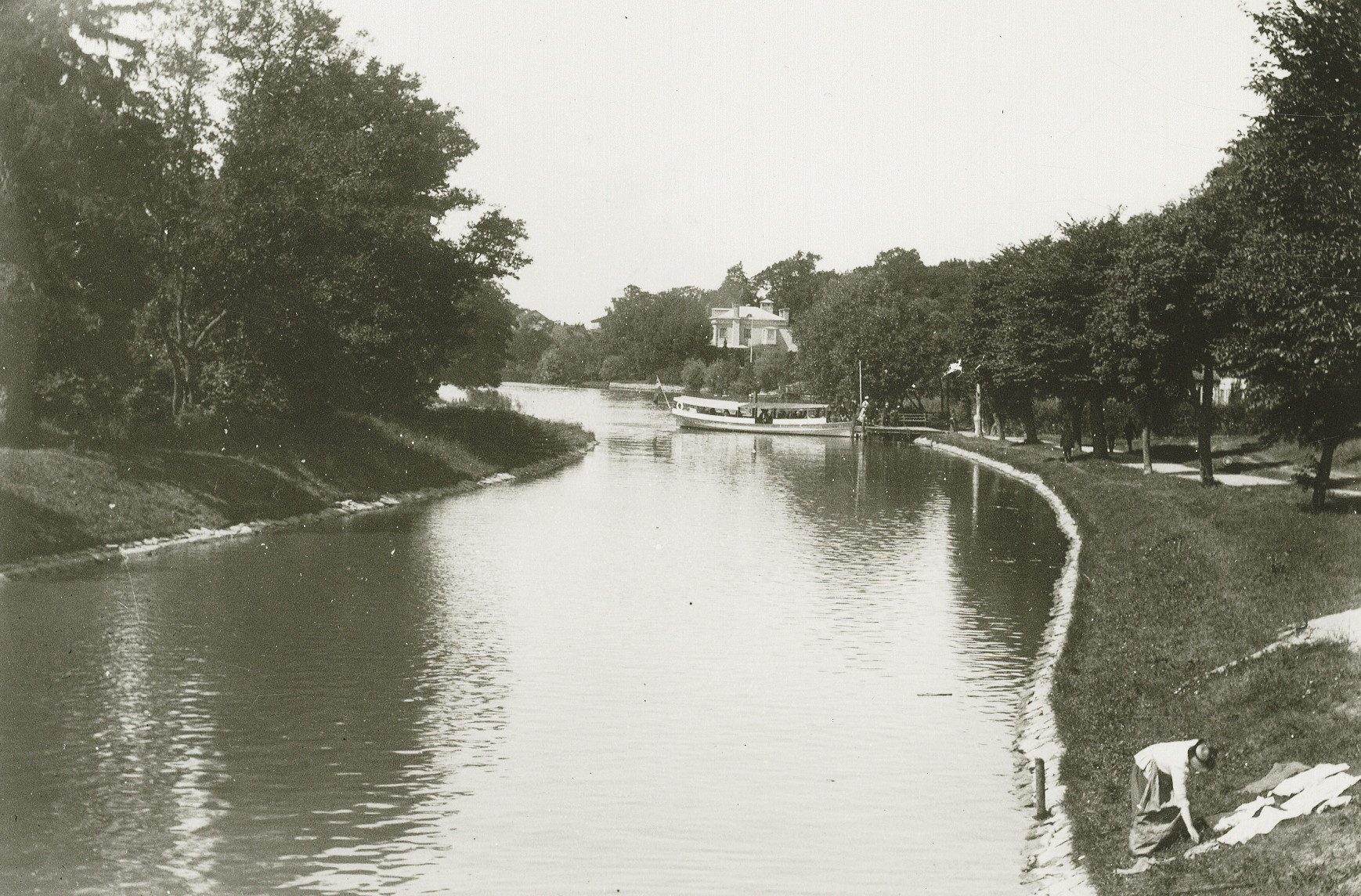 Djurgårdsbrunnskanalen